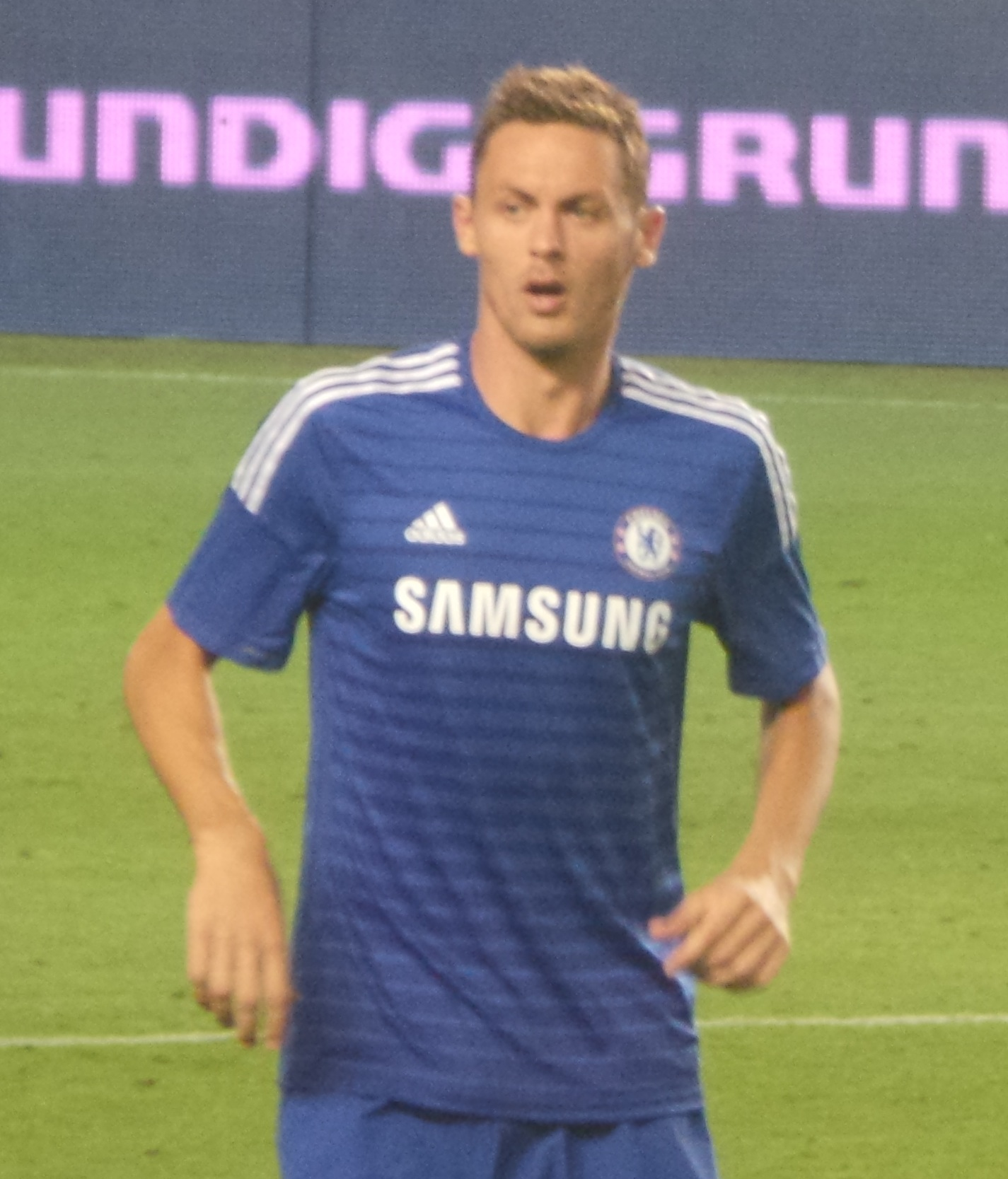 Nemanja Matic'14 in SOMA tournament